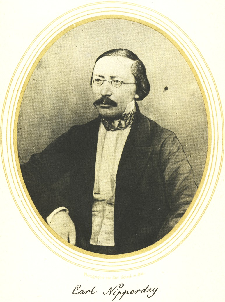 Porträt des Philologen Karl Ludwig Nipperdey; Fotografie von Carl Schenk (1813–1874)